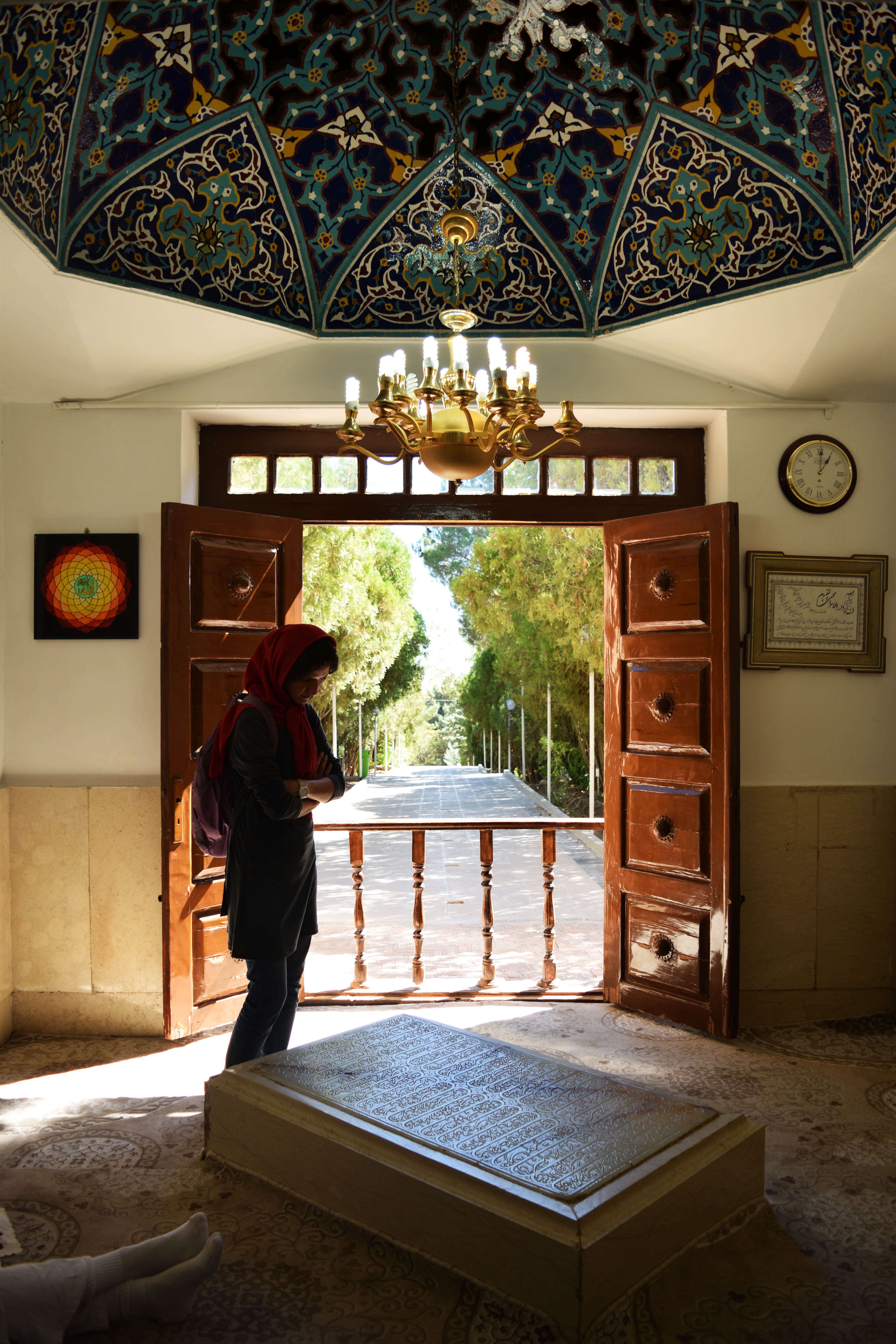 مقبره شیخ ابوالحسن خرقانی